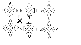 Code Templier